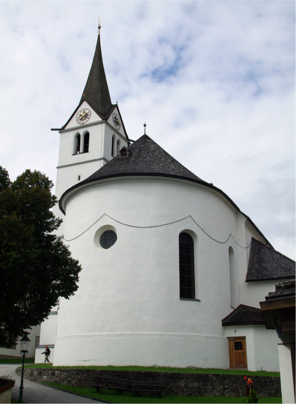 Kath. Pfarrkirche hl. Leonhard